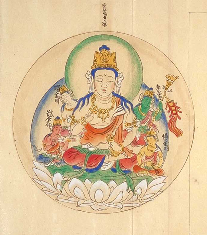 金剛薩埵五秘密法。鎌倉時代の仏像図集『図像抄』（十巻抄）より。印玄・抄。